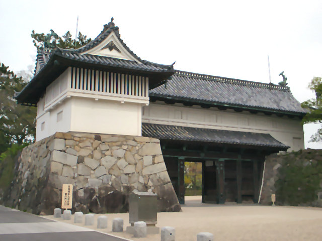 佐賀県佐賀城鯱の門